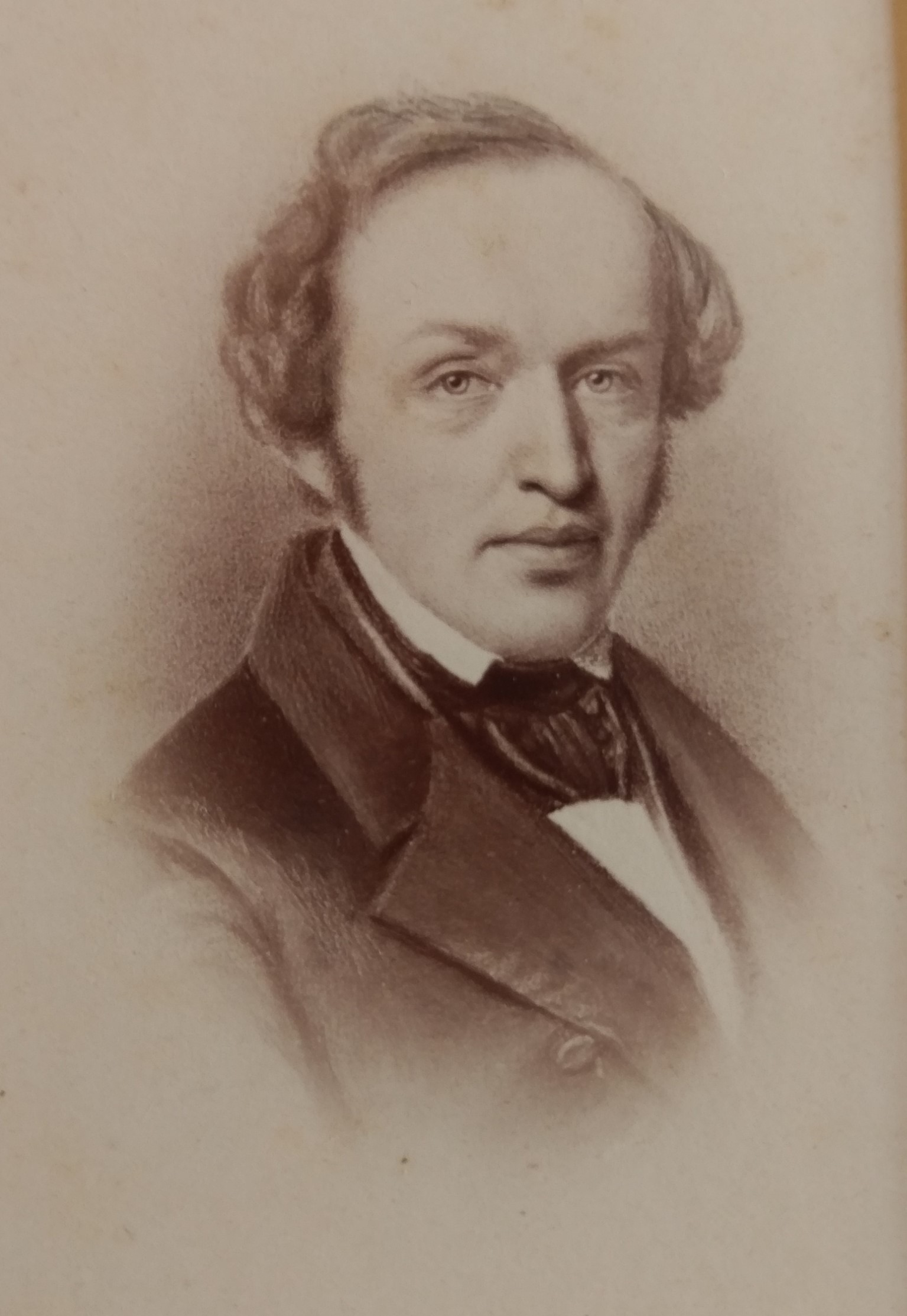 Carl Friedrich Ferdinand Joseph von Byla auf Wolkramshausen, *1806, †1852, Landrat des preußischen Landkreises Nordhausen 1834-1852